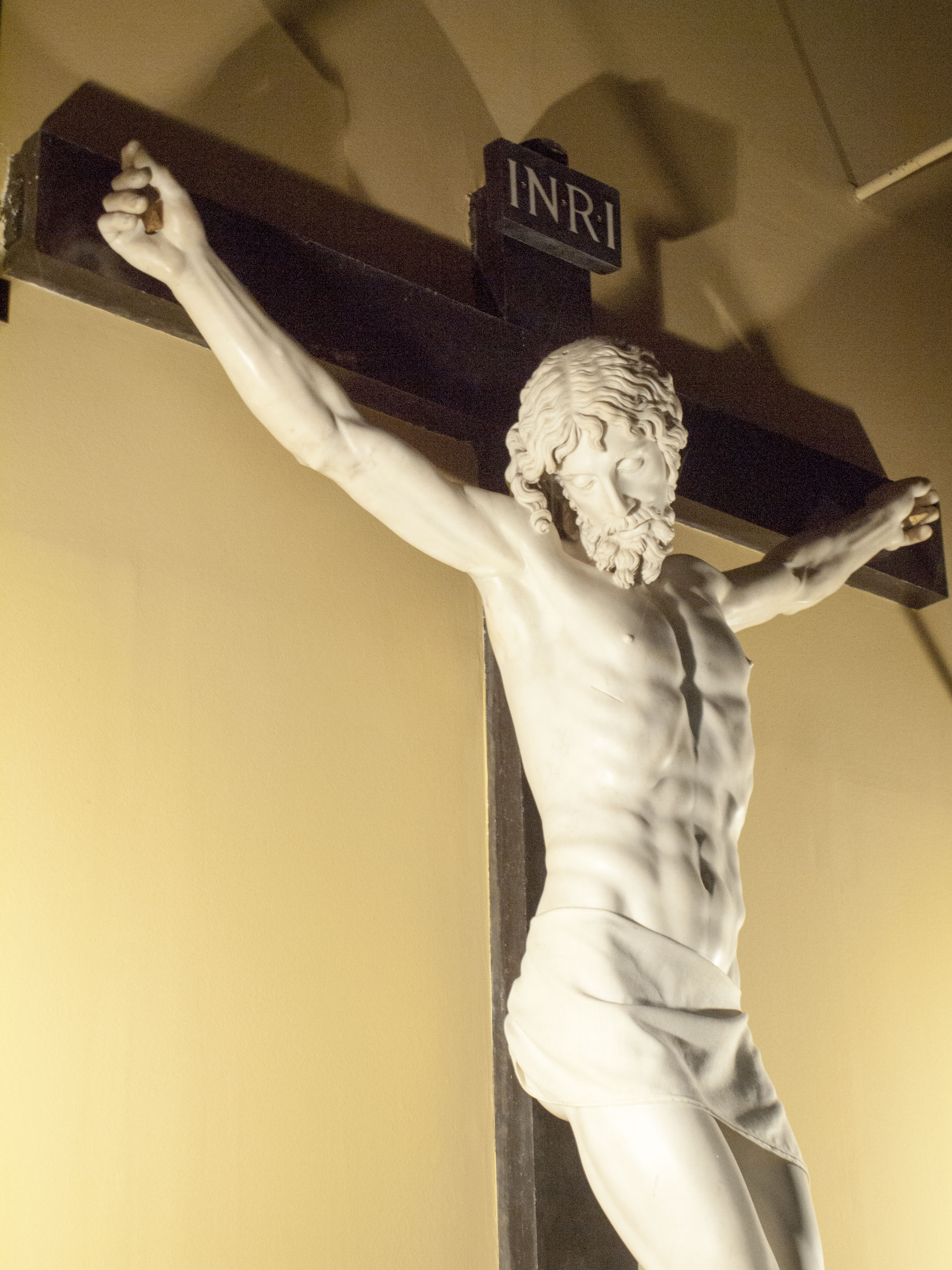 Cellinik bere hilobirako egindako kruxifijoa eta Felipe II eskuetan bukatu zen. Biluzik dagoen Kristo bakarrenetako bat, arastasun ohiala badu ere.